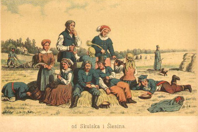 Folk of Kalisz region (Kaliskie)